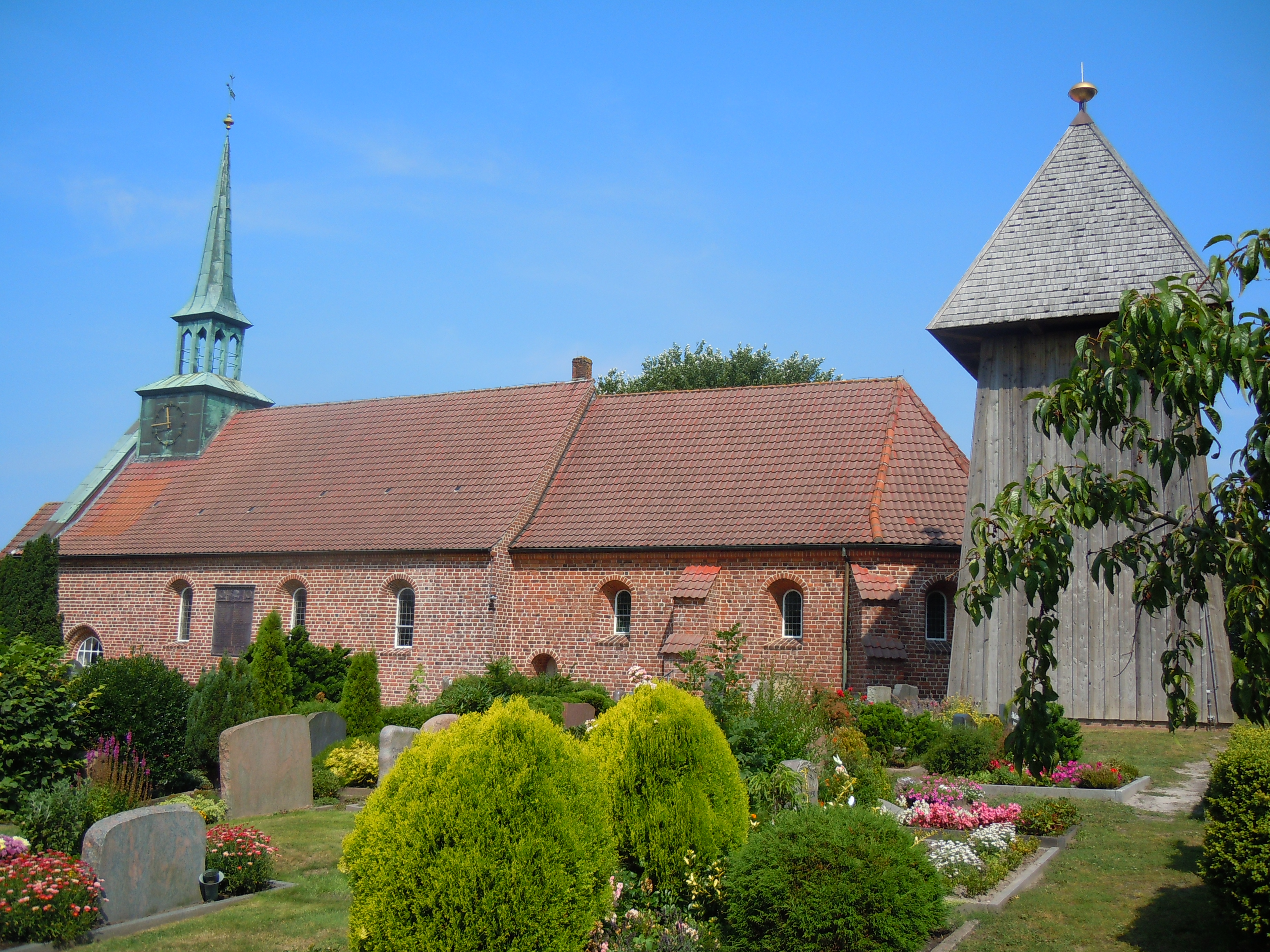 St. Peter-Dorf, St. Petri von Süden gesehen